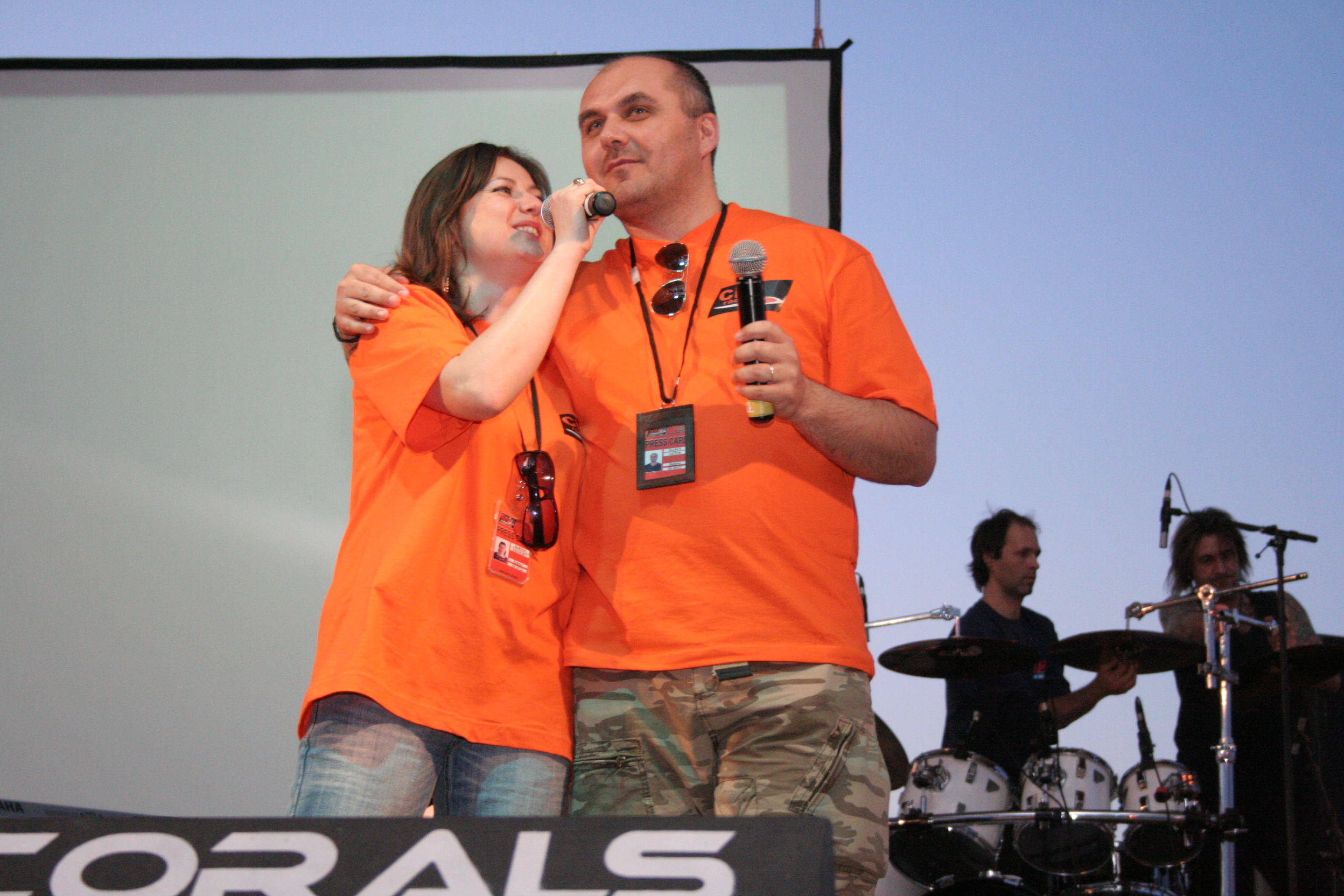 Dancs Artur, Bartos Erzsébet